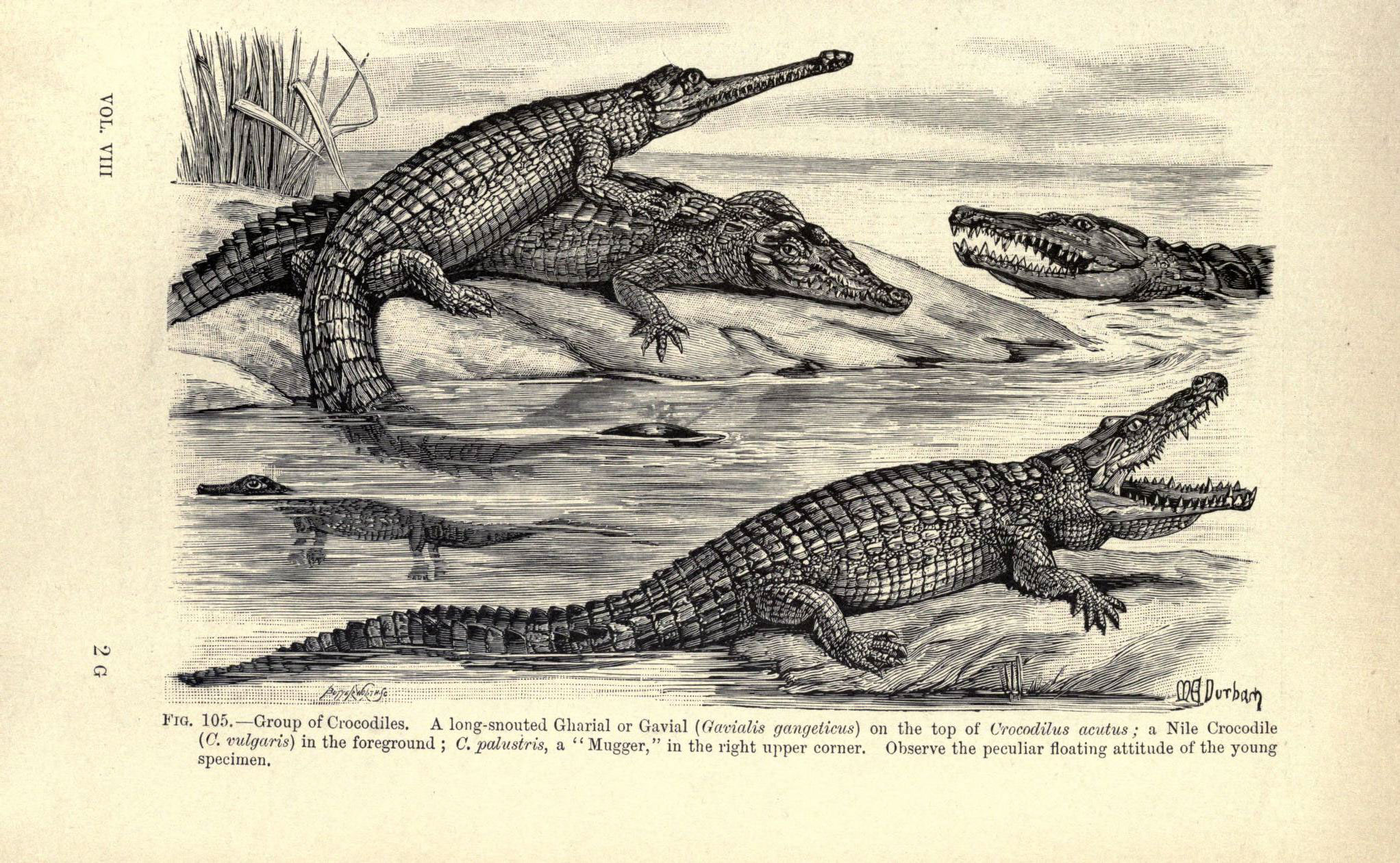 VOL. VIII 2G